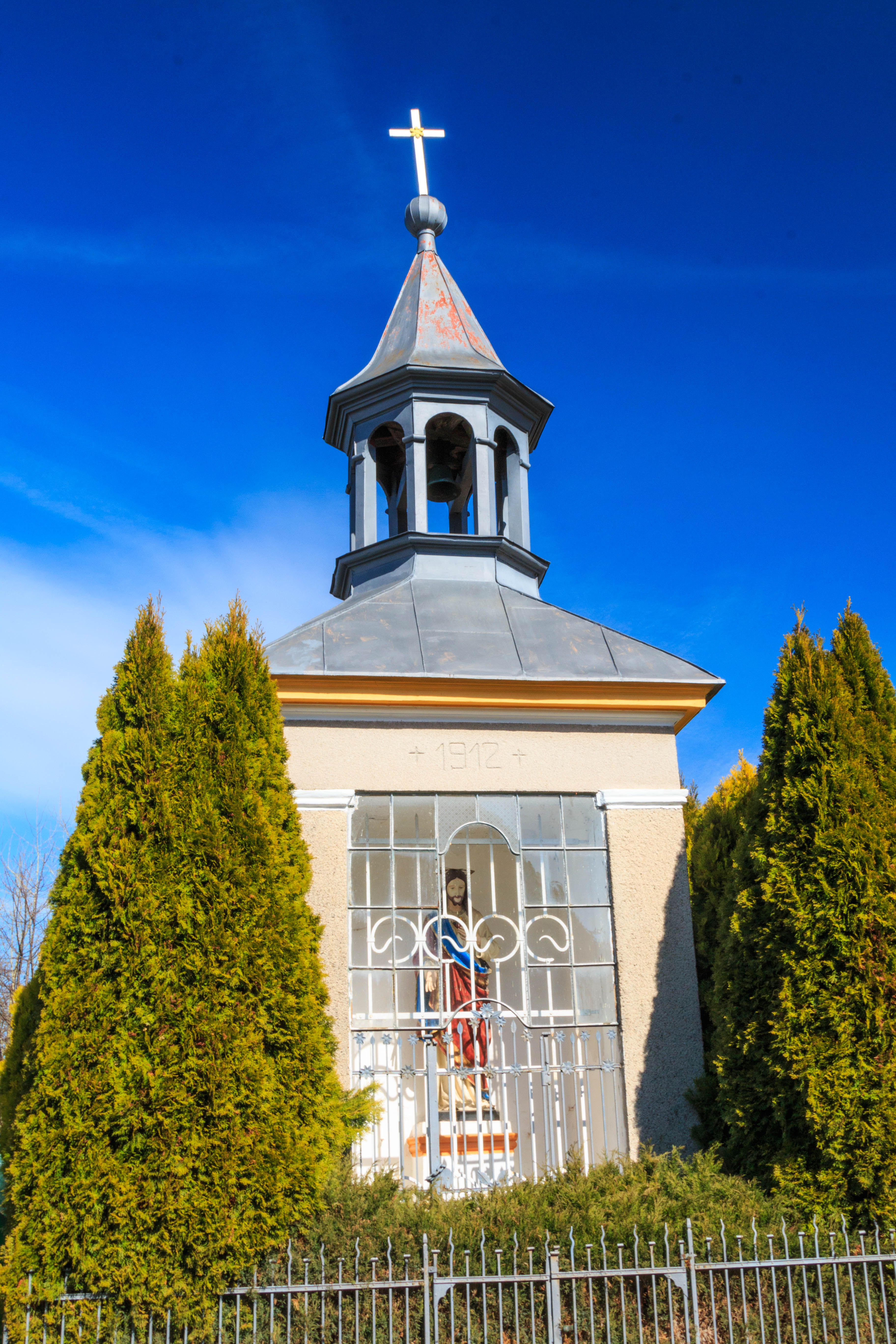 Suchá Rybná - kaple